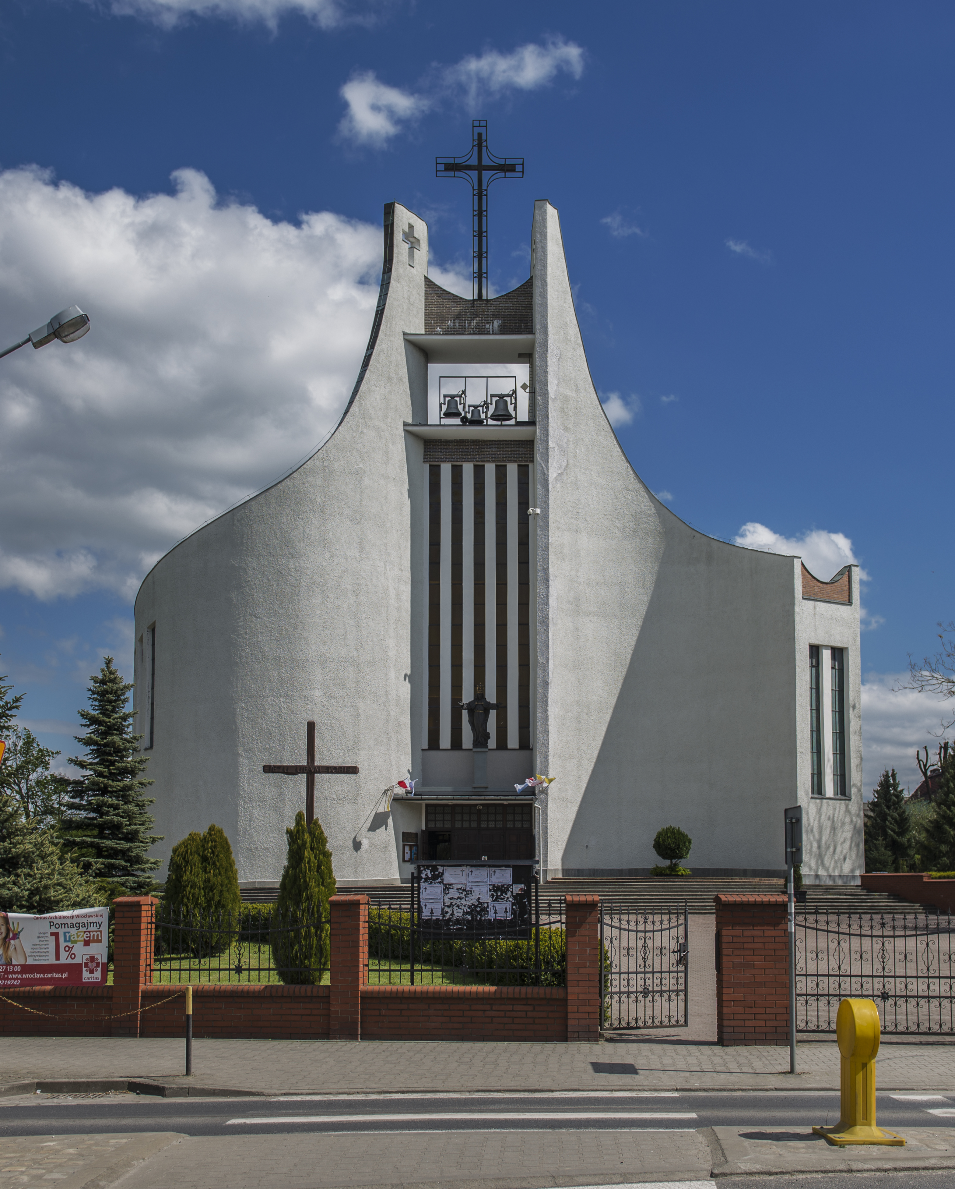 Parafia Najświętszej Maryi Panny Matki Miłosierdzia